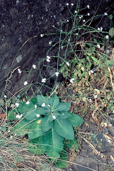 Schmächtiger Meerkohl (Crambe strigosa) Habitus, auf Teneriffa